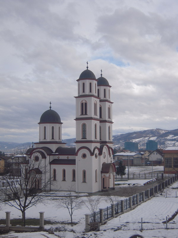 Храм Св. апостола Петра и Павла у насељу Петрићевац